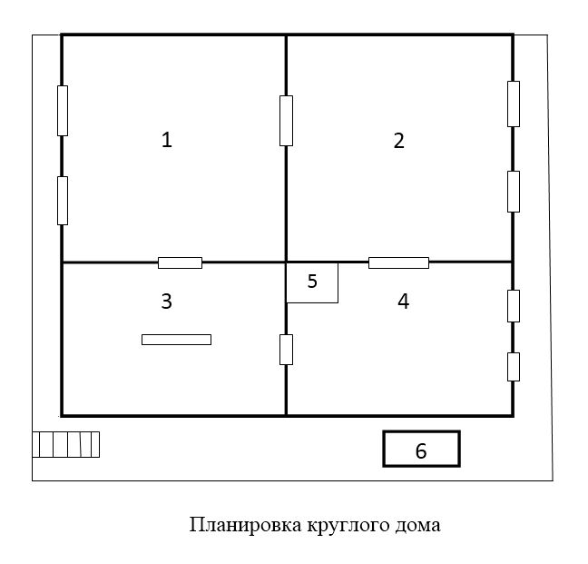 Казачья архитектура. Планировка круглого дома. По материалам ст. Н.С, Попова. Жилище Донских казаков в ареальном аспекте. Вестник ЮНЦ РАН т. 8 №2 2012г.